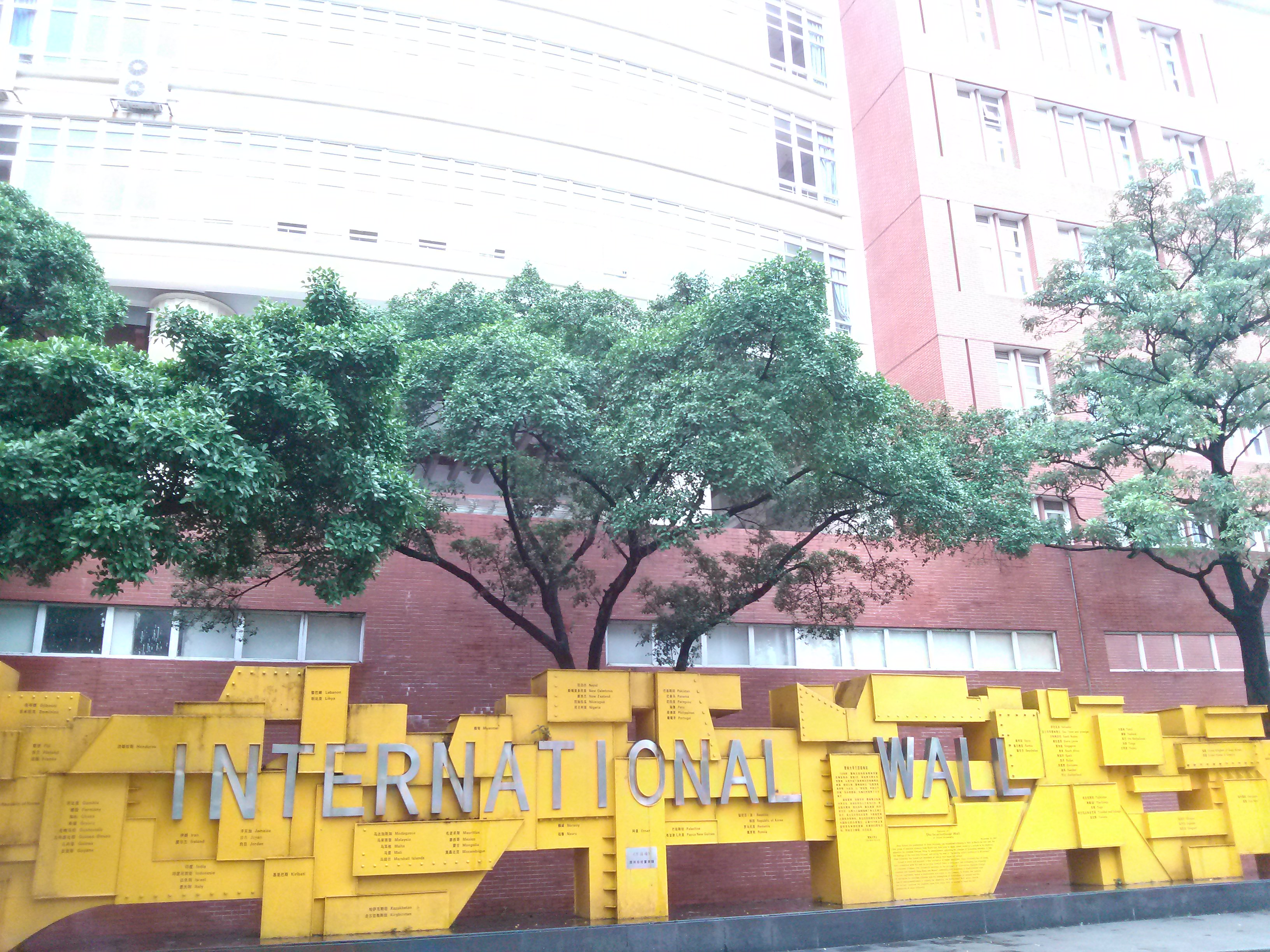 暨南大學本部萬國牆